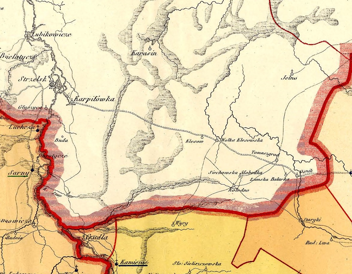 Клесів 1600 рік приблизно.